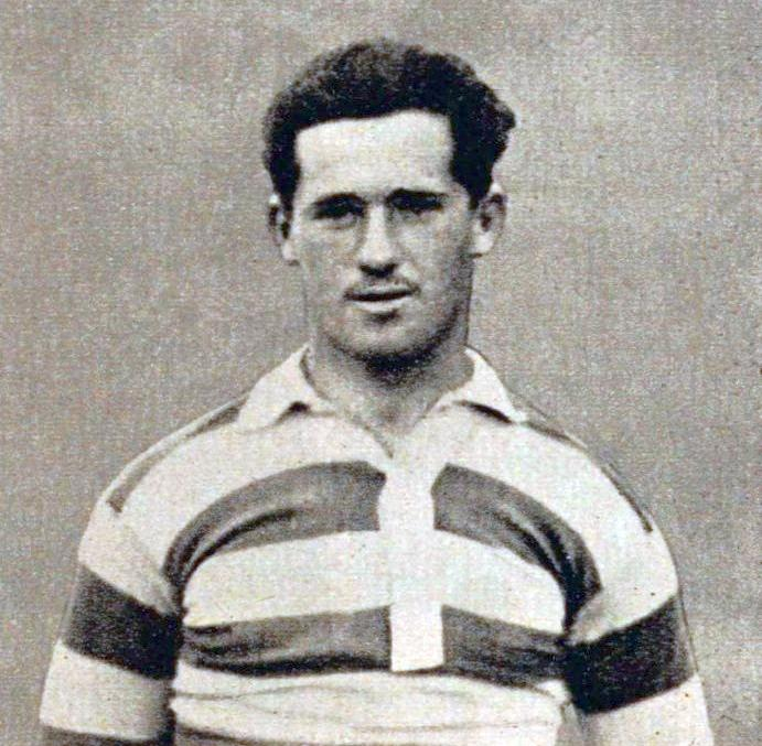 Adolphe Bousquet en 1922